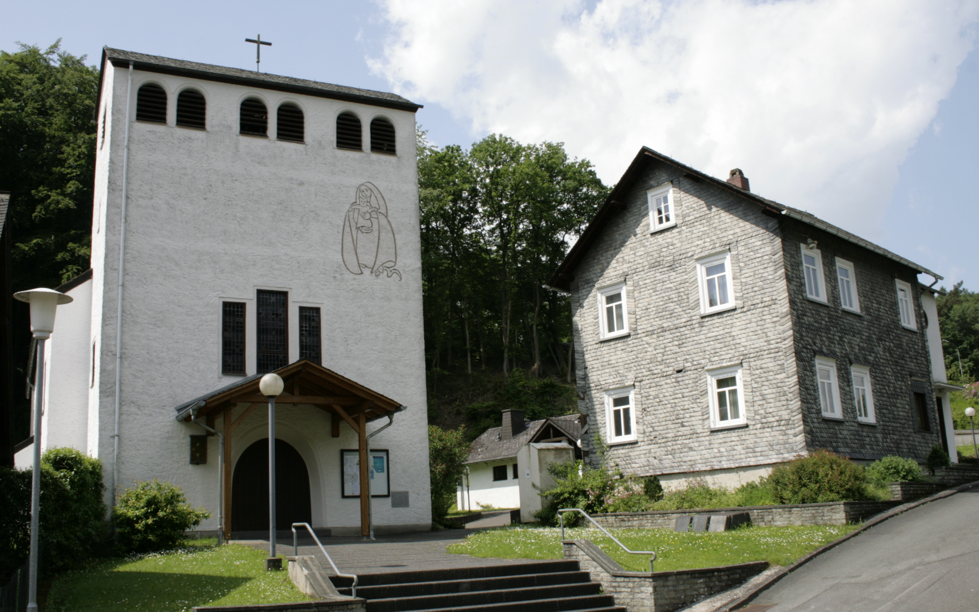 Kirche und Pfarrhaus in Langhecke, Deutschland